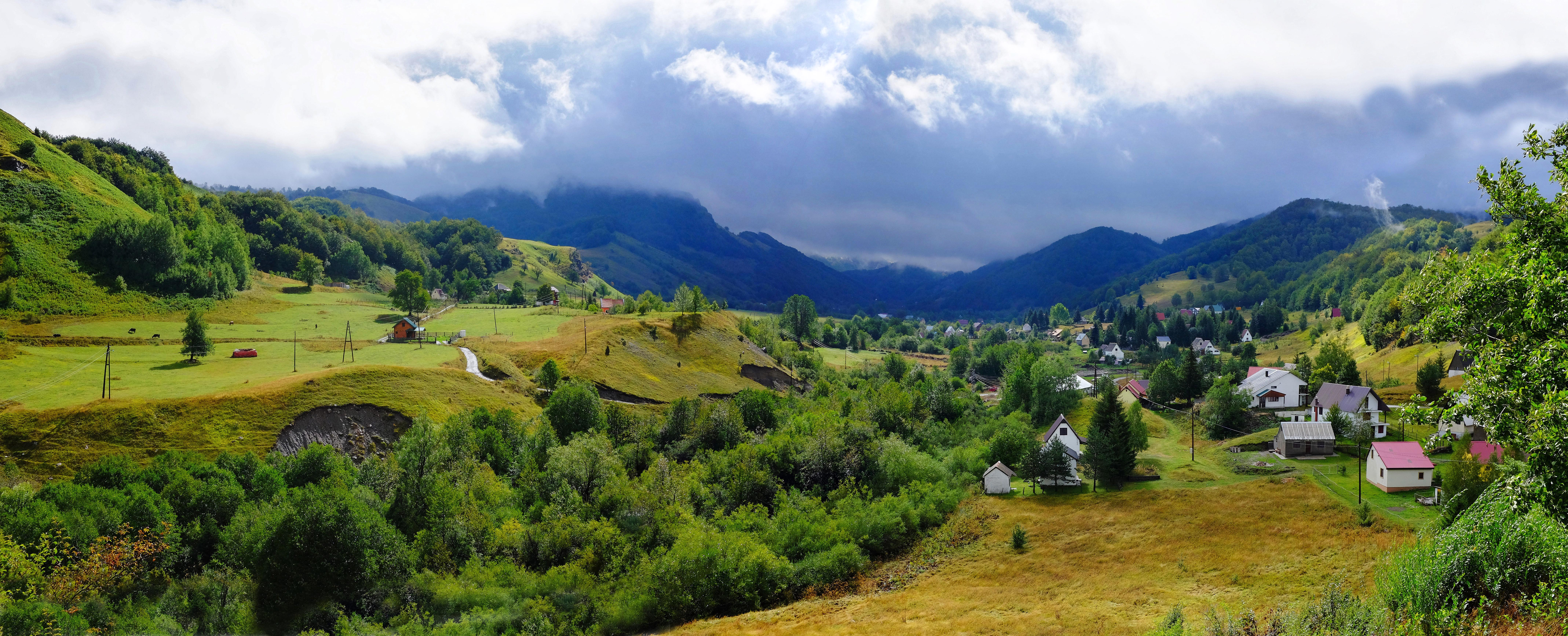 Village Veruša in Podgorica municipality